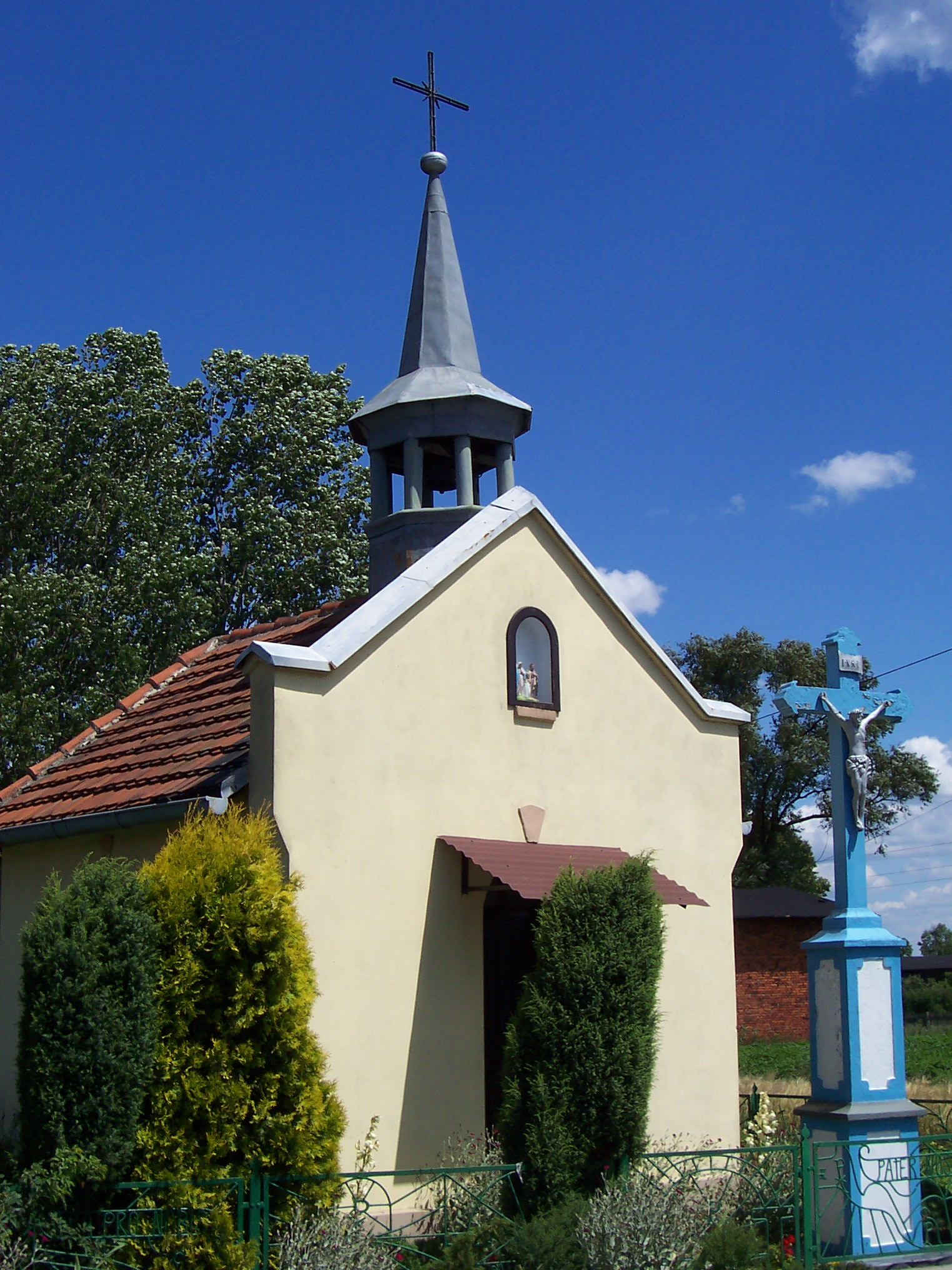 Kapliczka w miejscowości Jasiona